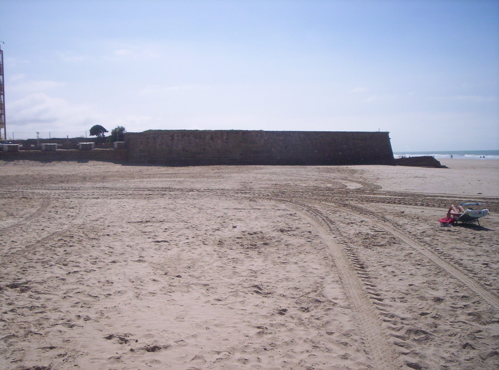 Muralla de Cortadura, que separa la playa de ídem de la de la Victoria, en Cádiz (España).